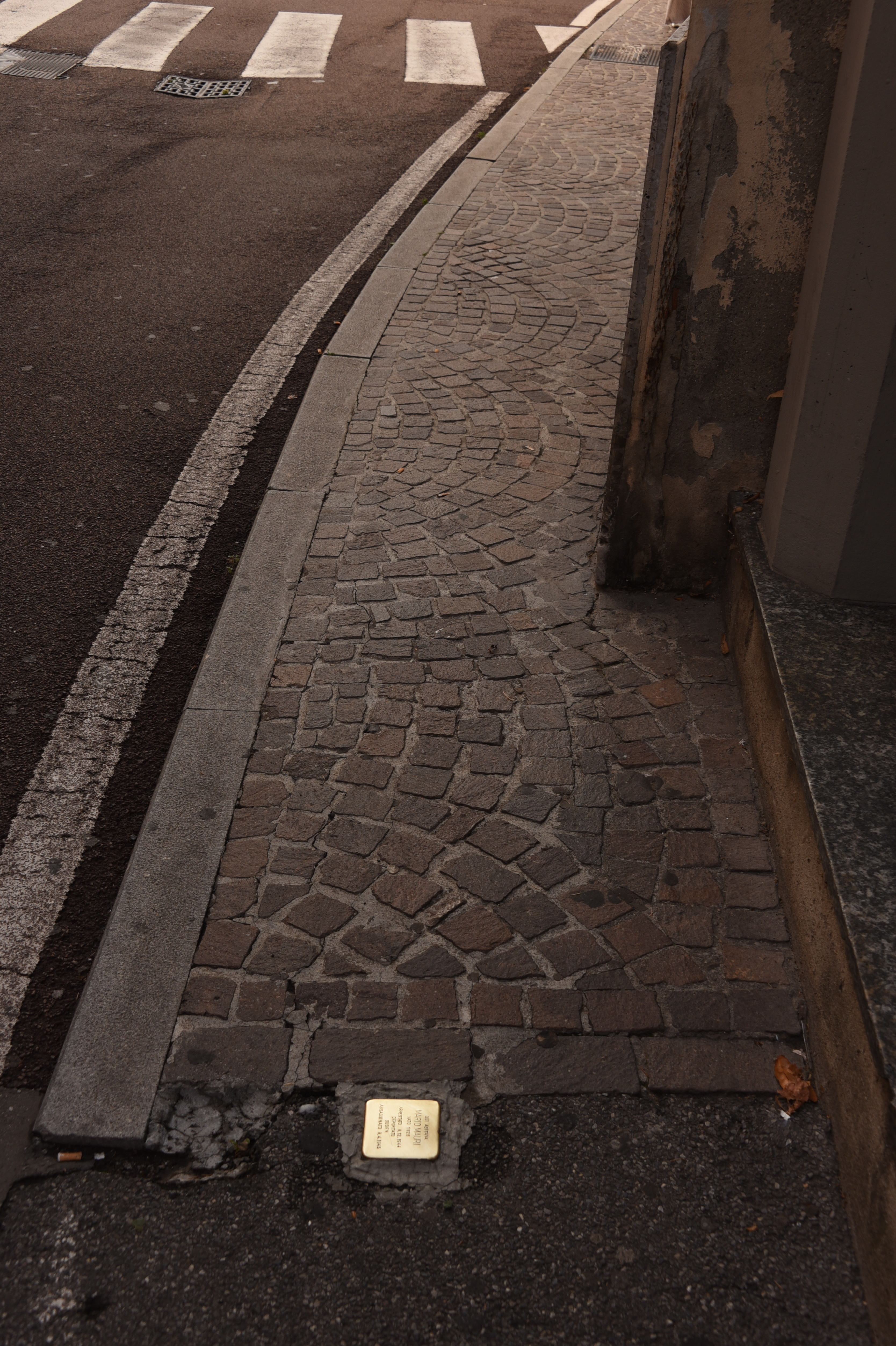 Stolperstein in Muggio